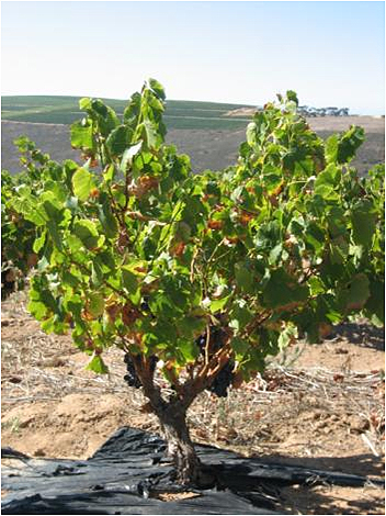 Busch Erziehung in Afrika